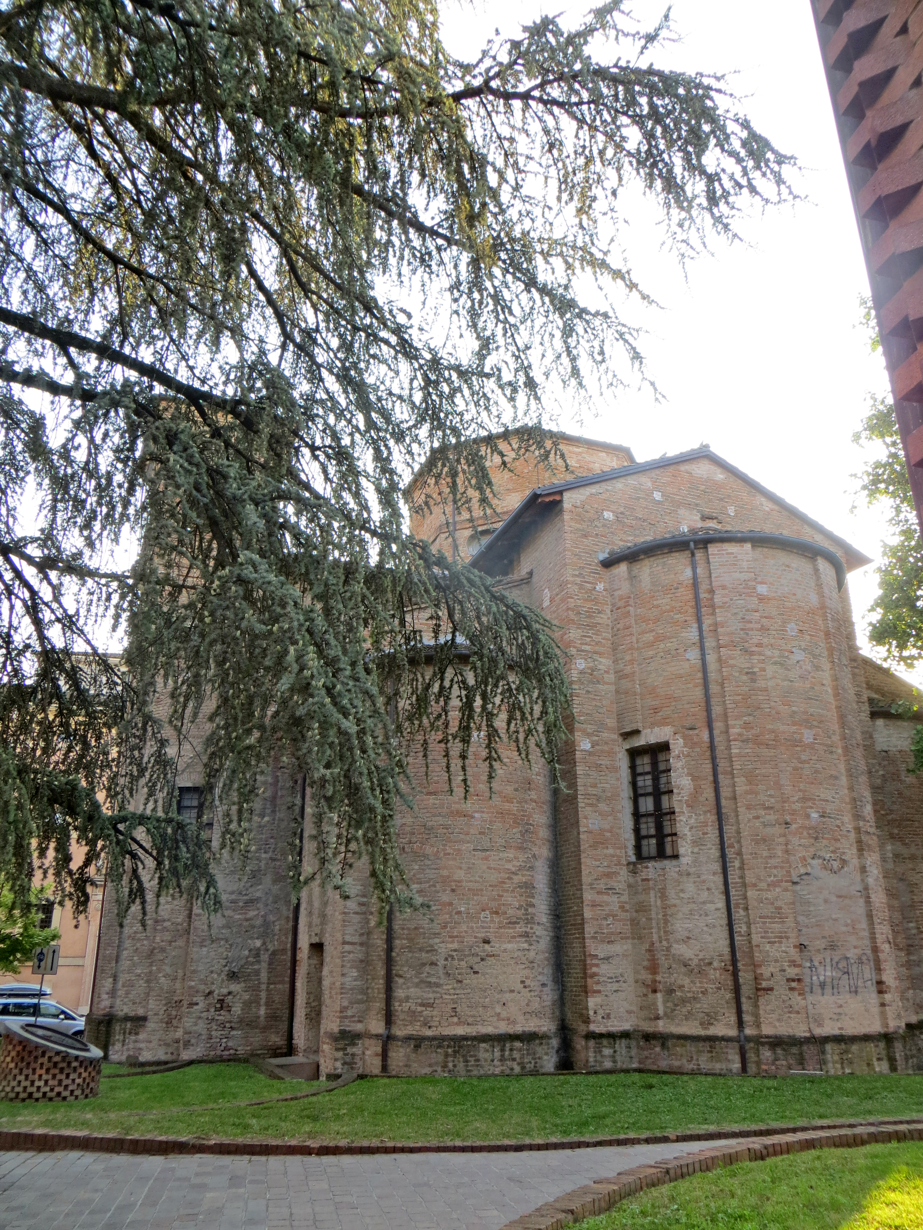 Chiesa di San Michele Arcangelo (Fidenza) - abside